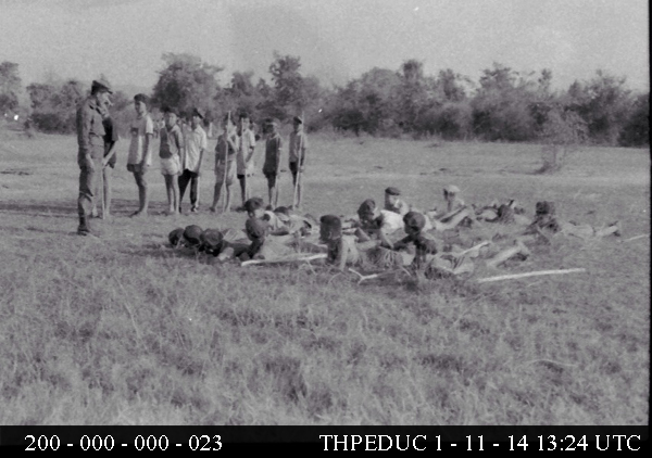 การฝึกอบรมลูกเสือโรงเรียนชัยภูมิภักดีชุมพลเมื่อปี 2508 ซึ่งเป็นการฝึกลูกเสือภาคสนามในบริเวณโรงเรียน ต้นฉบับภาพได้จากพิพิธภัณฑ์โรงเรียนชัยภูมิภักดีชุมพล ศูนย์เรียนรู้ไทยภัณฑ์